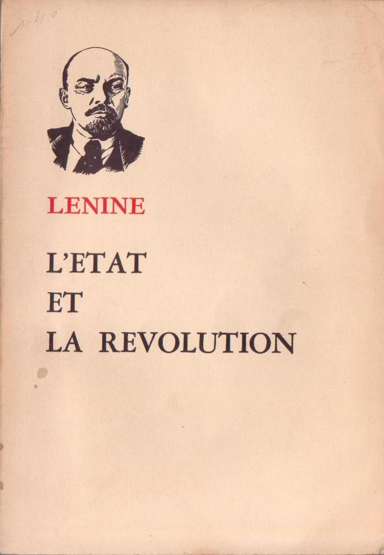 Livre l'État et la Révolution de Lénine, paru en 1917